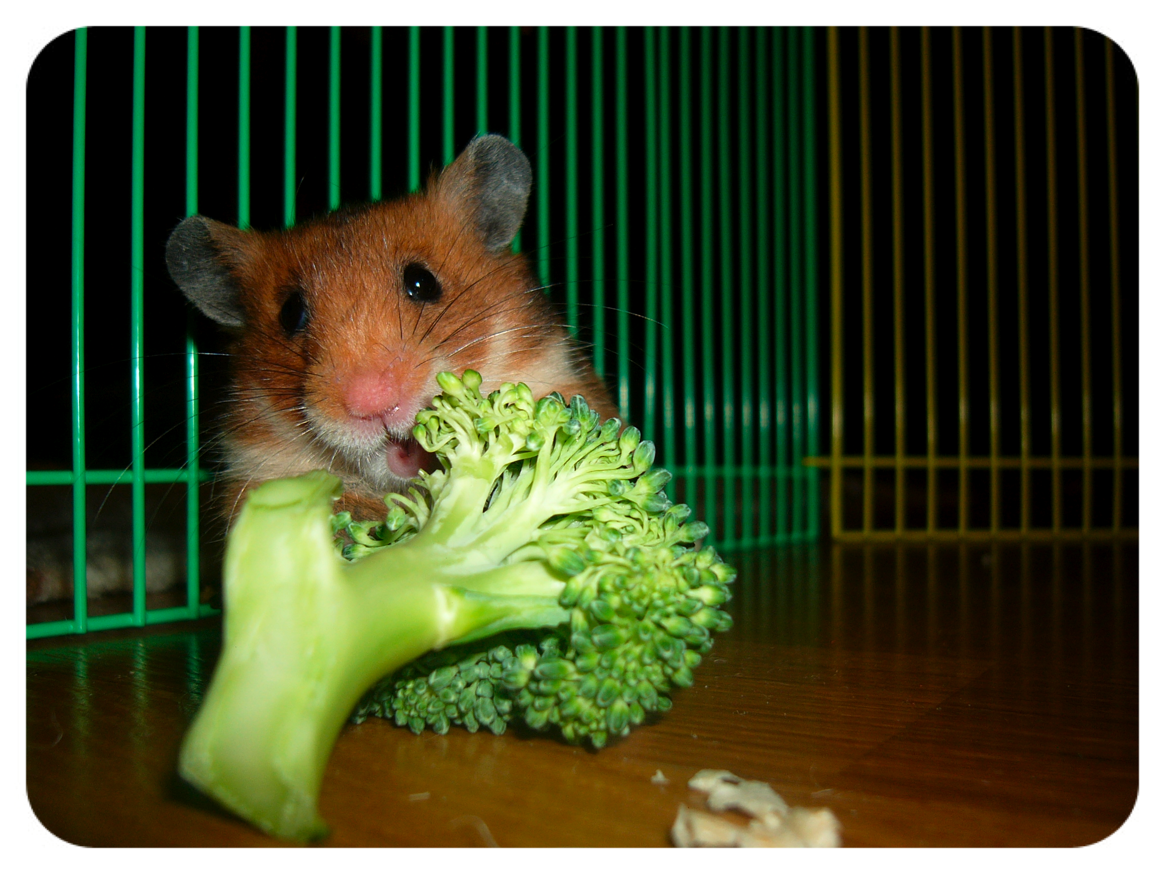 hamster